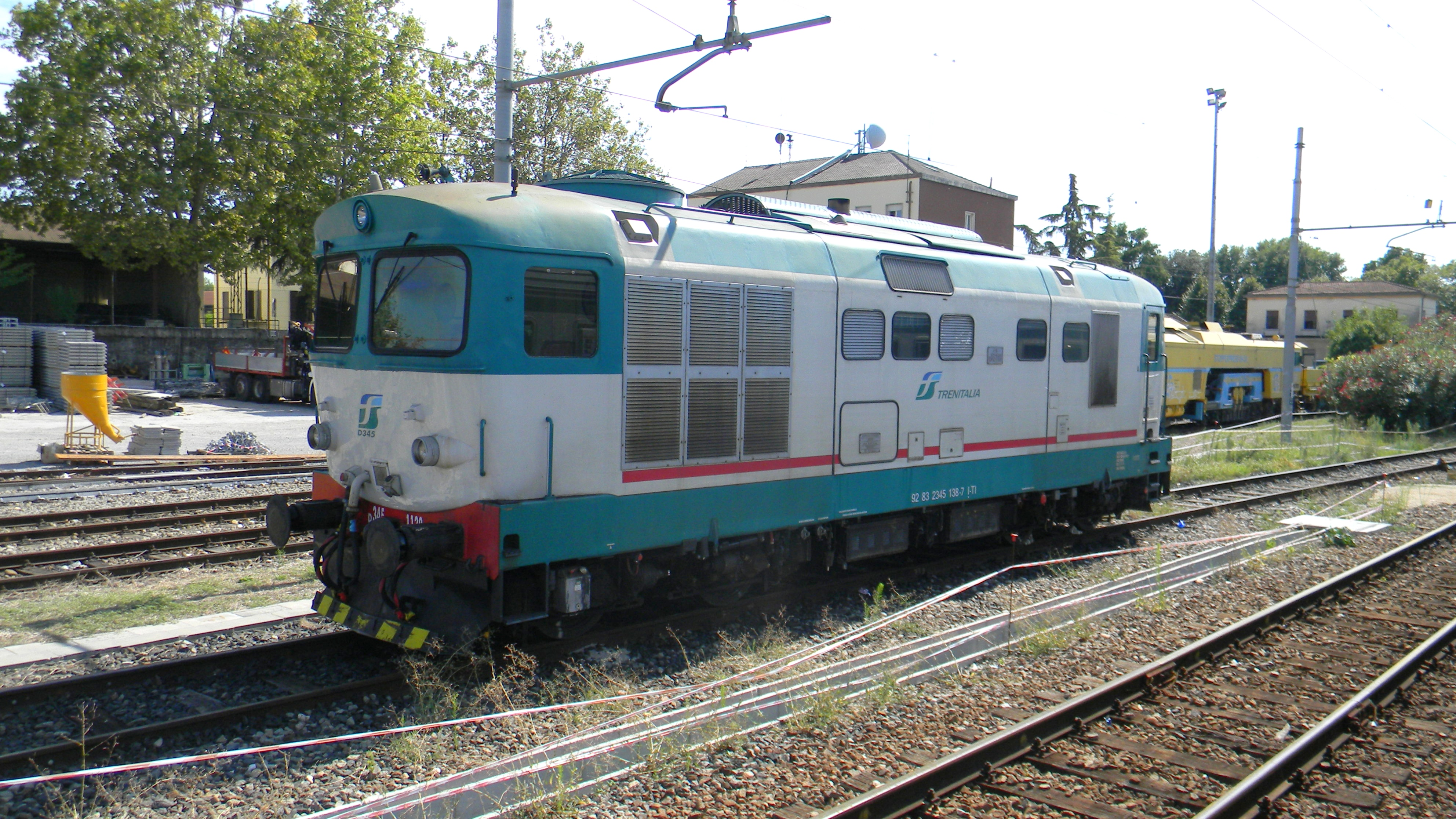 Locomotiva FS D.345 in sosta alla stazione di Peschiera del Garda (VR).